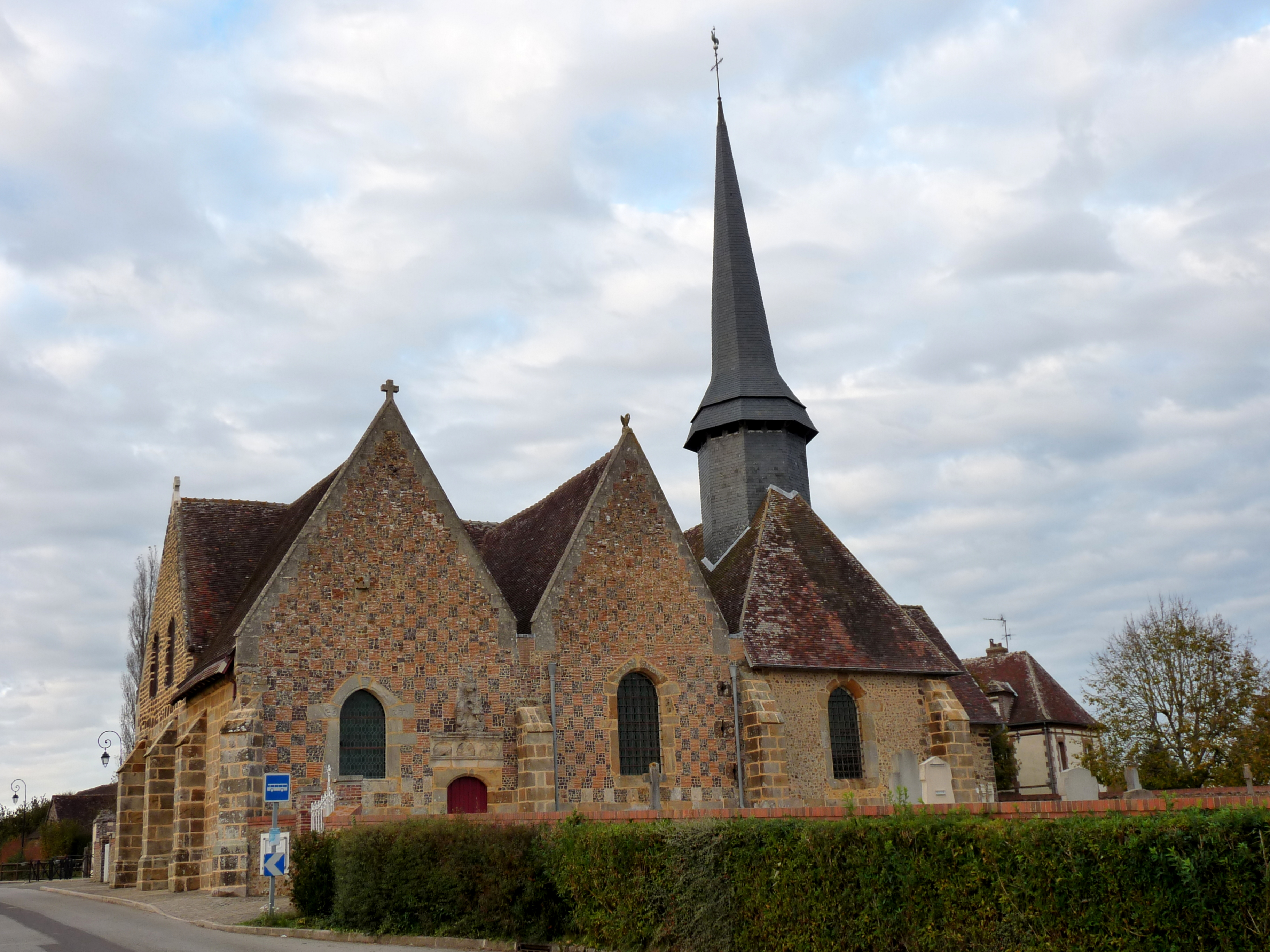 Église Saint-Pierre de Chéronvilliers